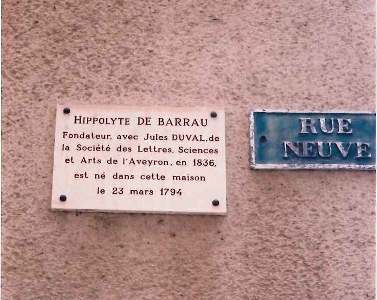 Plaque, Rue neuve, Rodez (Aveyron)